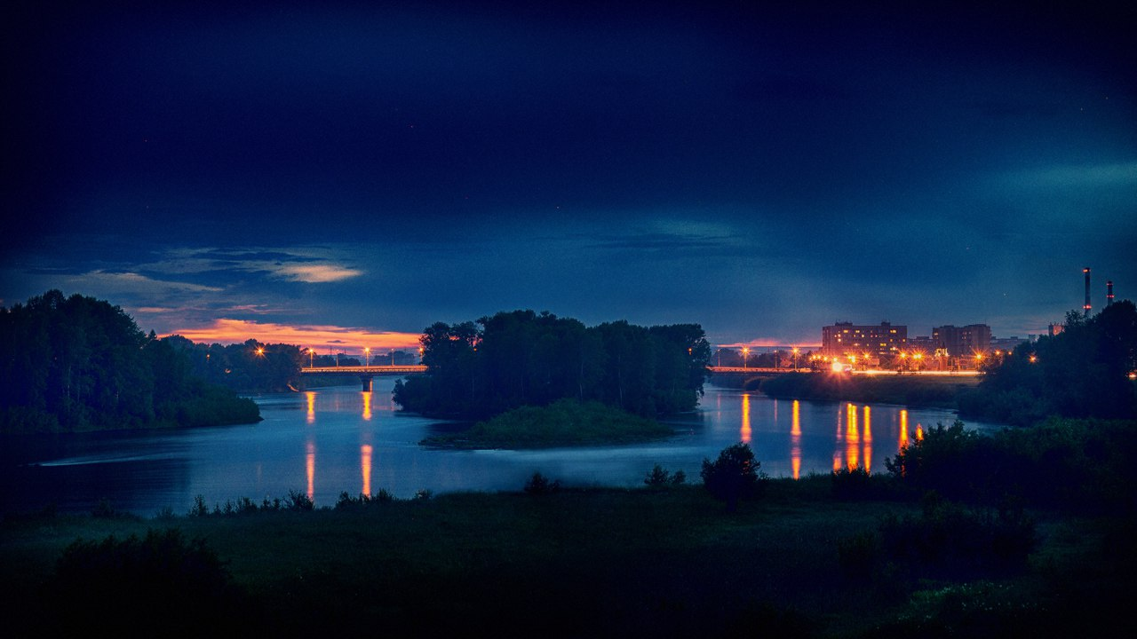 Автомобильный мост через реку Кан